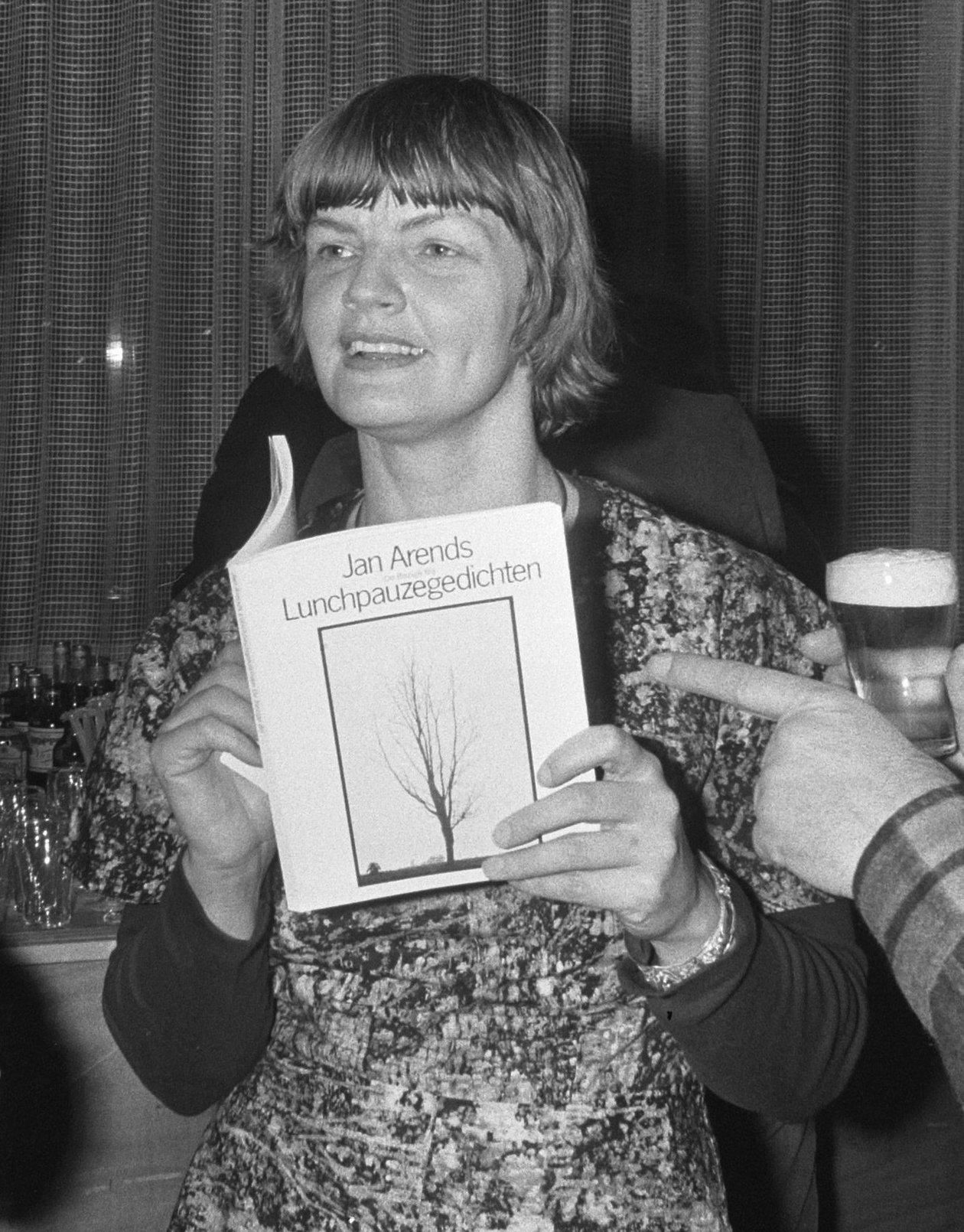 Boekenweekmanifestatie in het Van Goghmuseum, Amsterdam (The Netherlands), 8 maart 1974. De Vreede heeft het boek Lunchpauzegedichten" van Jan Arends in handen